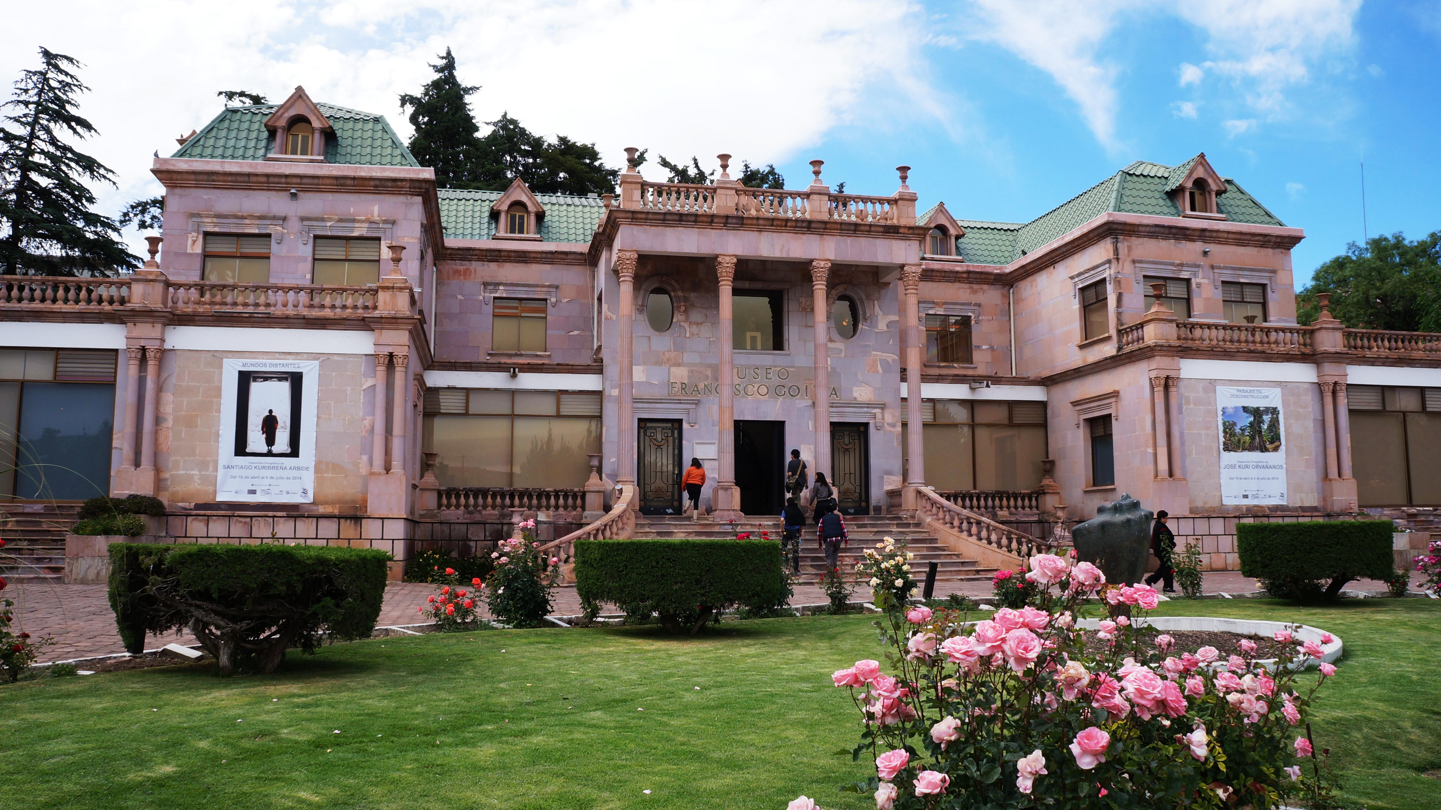 Bello edificio destinado a la protección y exhibición de la obra de este gran pintor zacatecano.